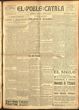 Portada del Diari El Poble Català, concretament el número 2404.